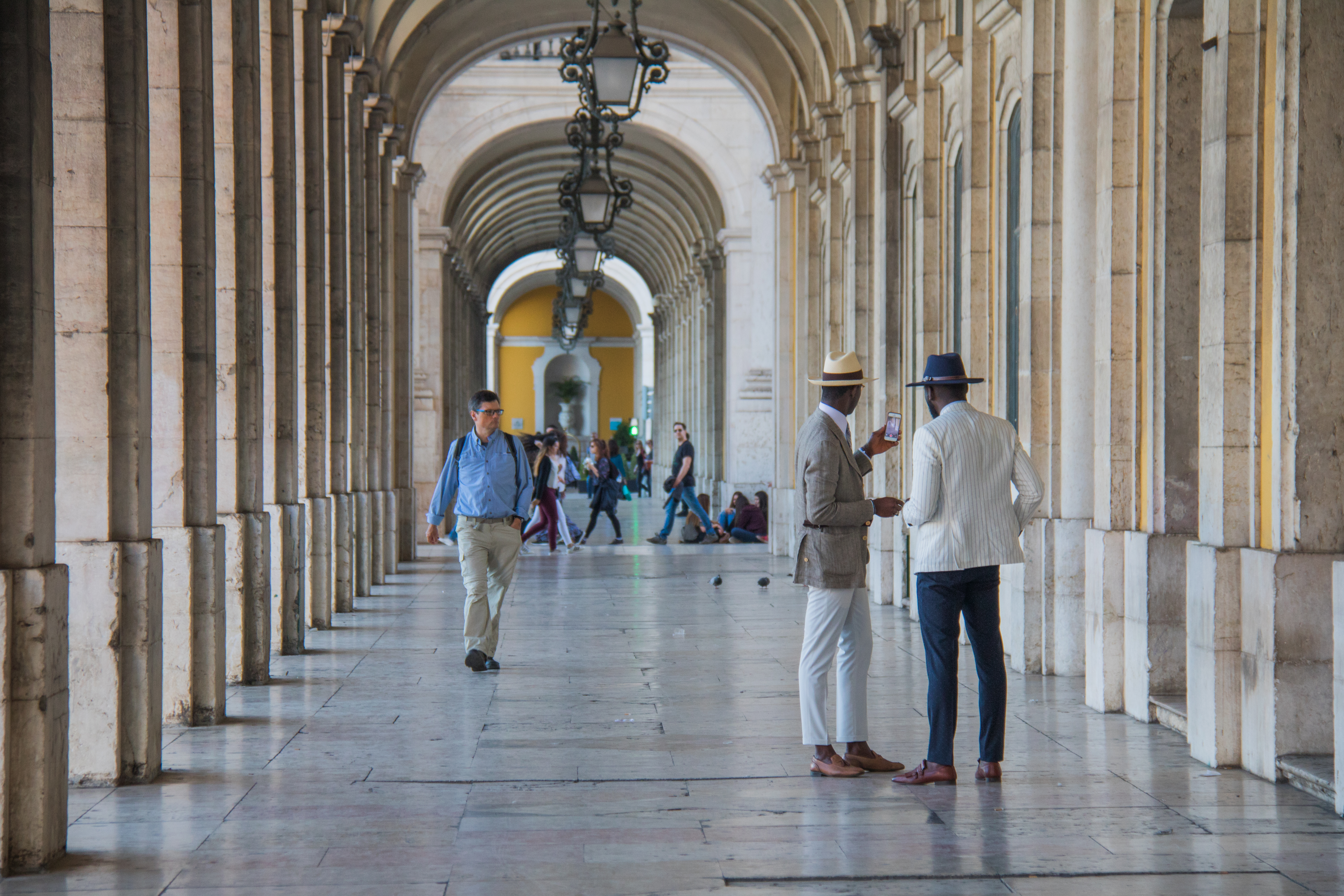 Men